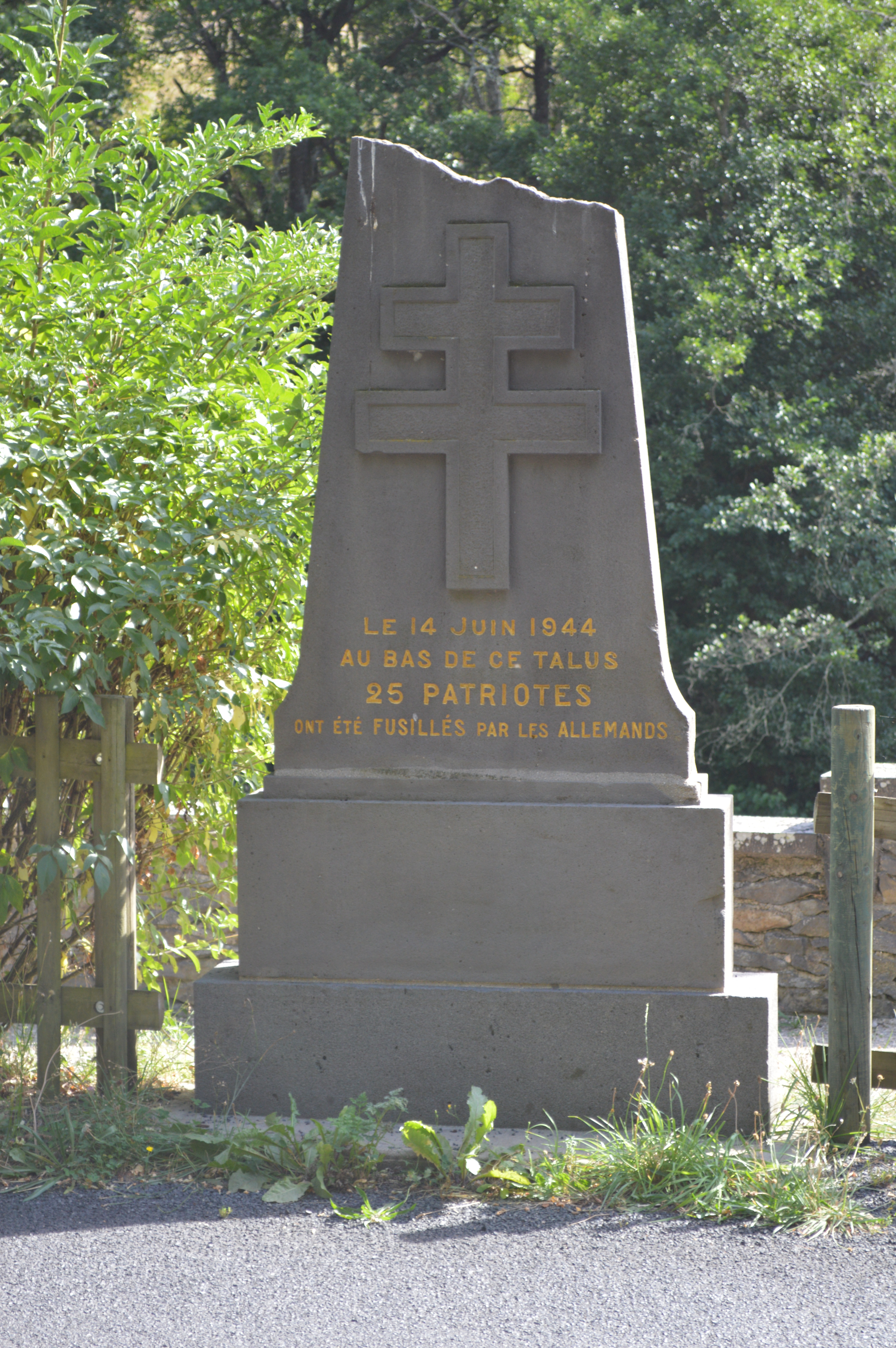 Monument aux 25 fusillés de Soubizergues (dont le fils de Louis Mallet, Pierre Mallet)